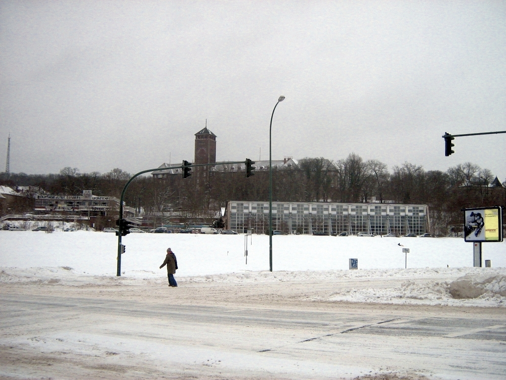 Leipziger Dreieck in Potsdam, Blick auf die Schwimmhalle, das Restaurant „Minsk“ und das Reichsarchiv auf dem Brauhausberg.